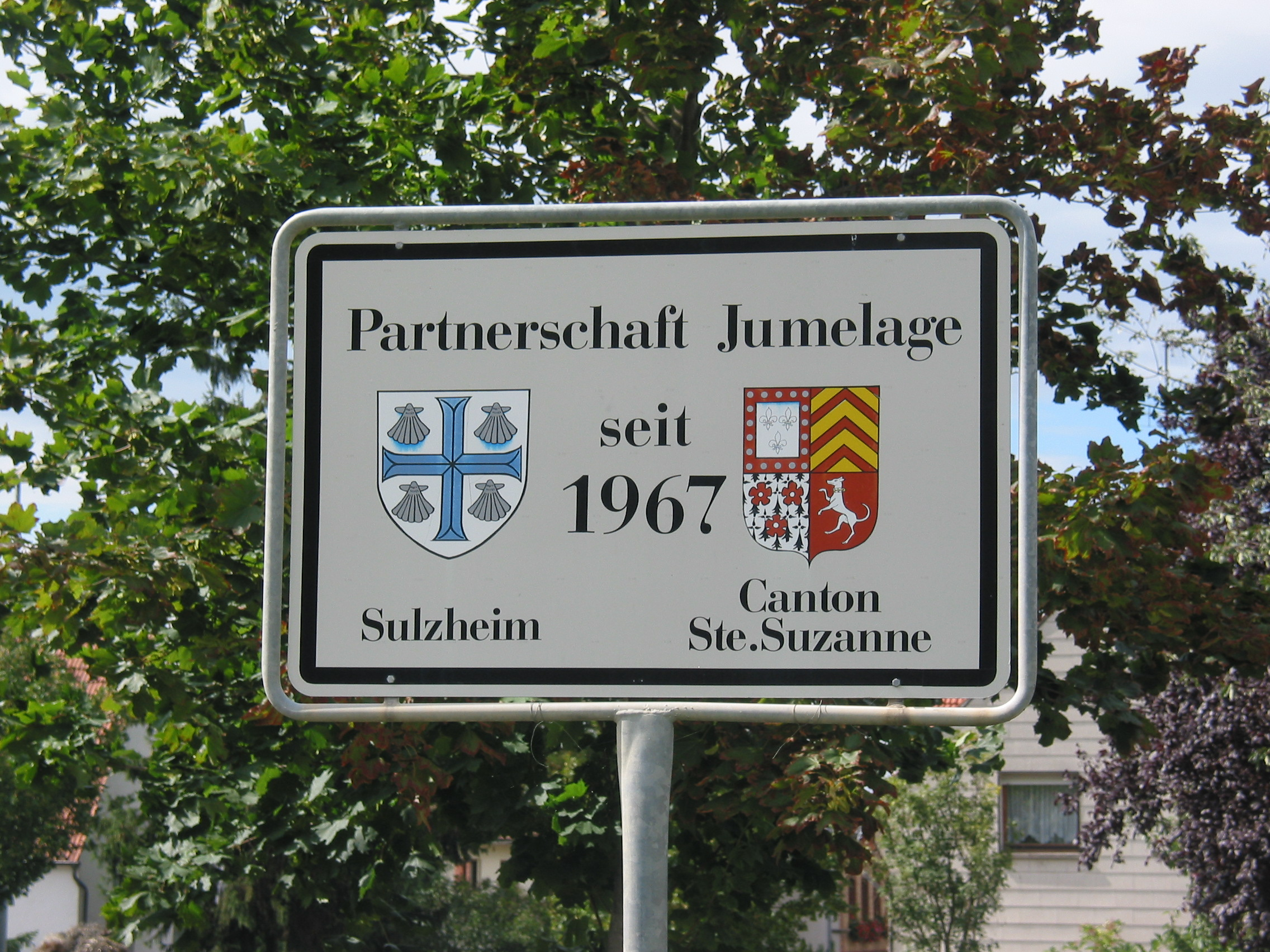 Panneau de jumelage Sulzheim / Ste-Suzanne